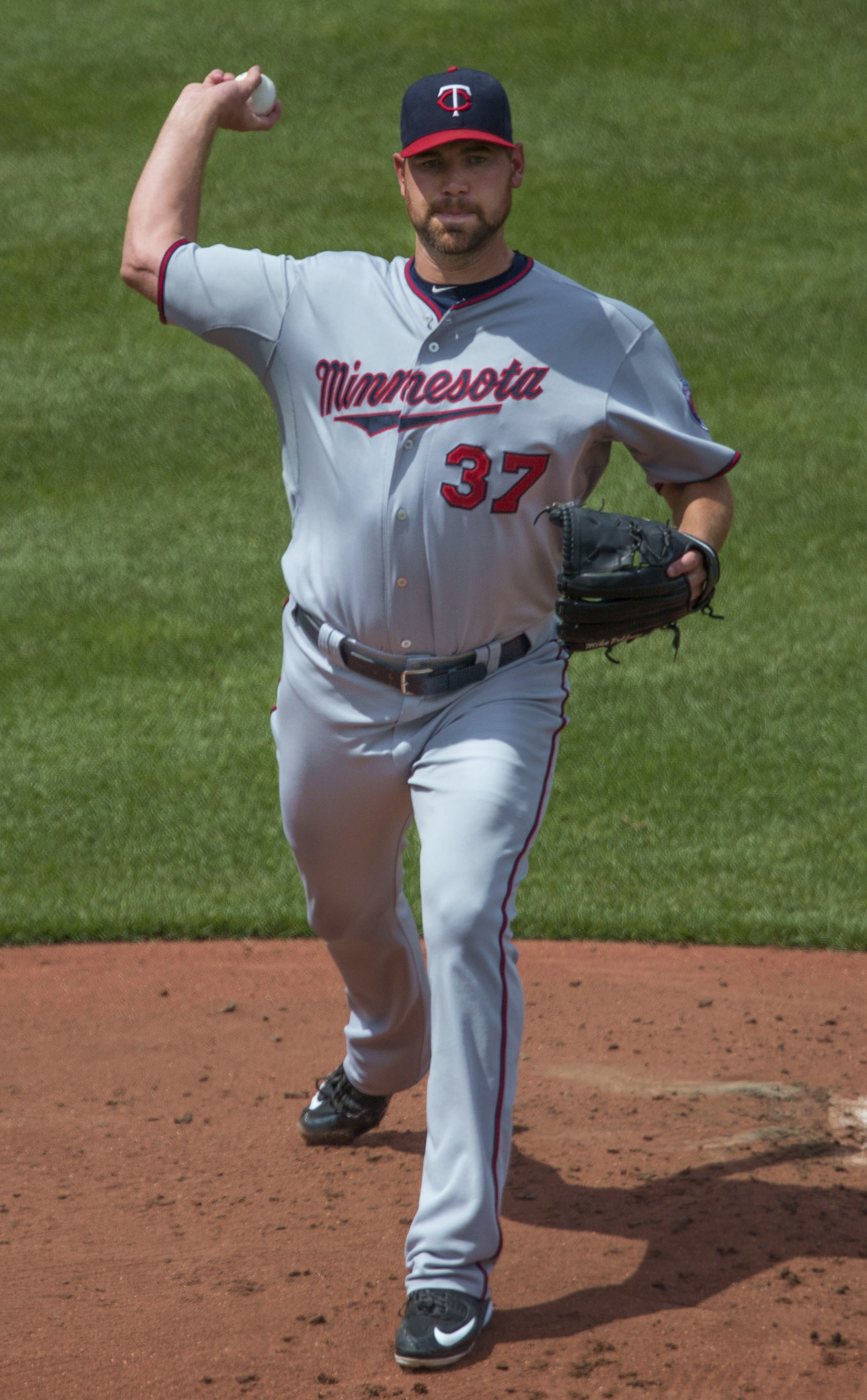 Mike Pelfrey